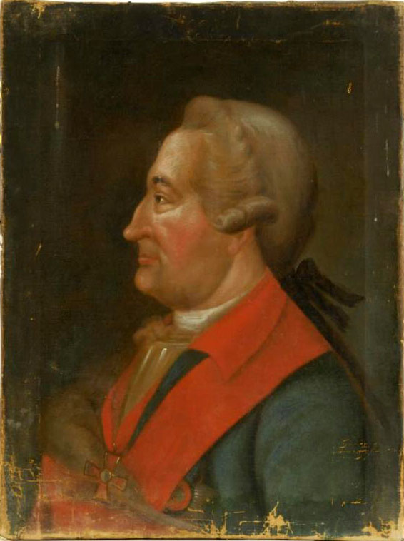 Вейсман фон Вейсенштейн, Отто Адольф